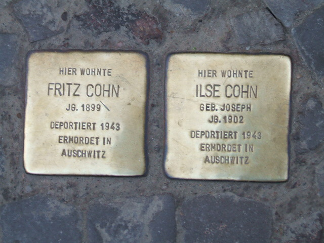 Stralsund,_Germany,_Stolpersteine_Fritz_und_Ilse_Cohn,_Ossenreyerstraße_(2006-09-26)